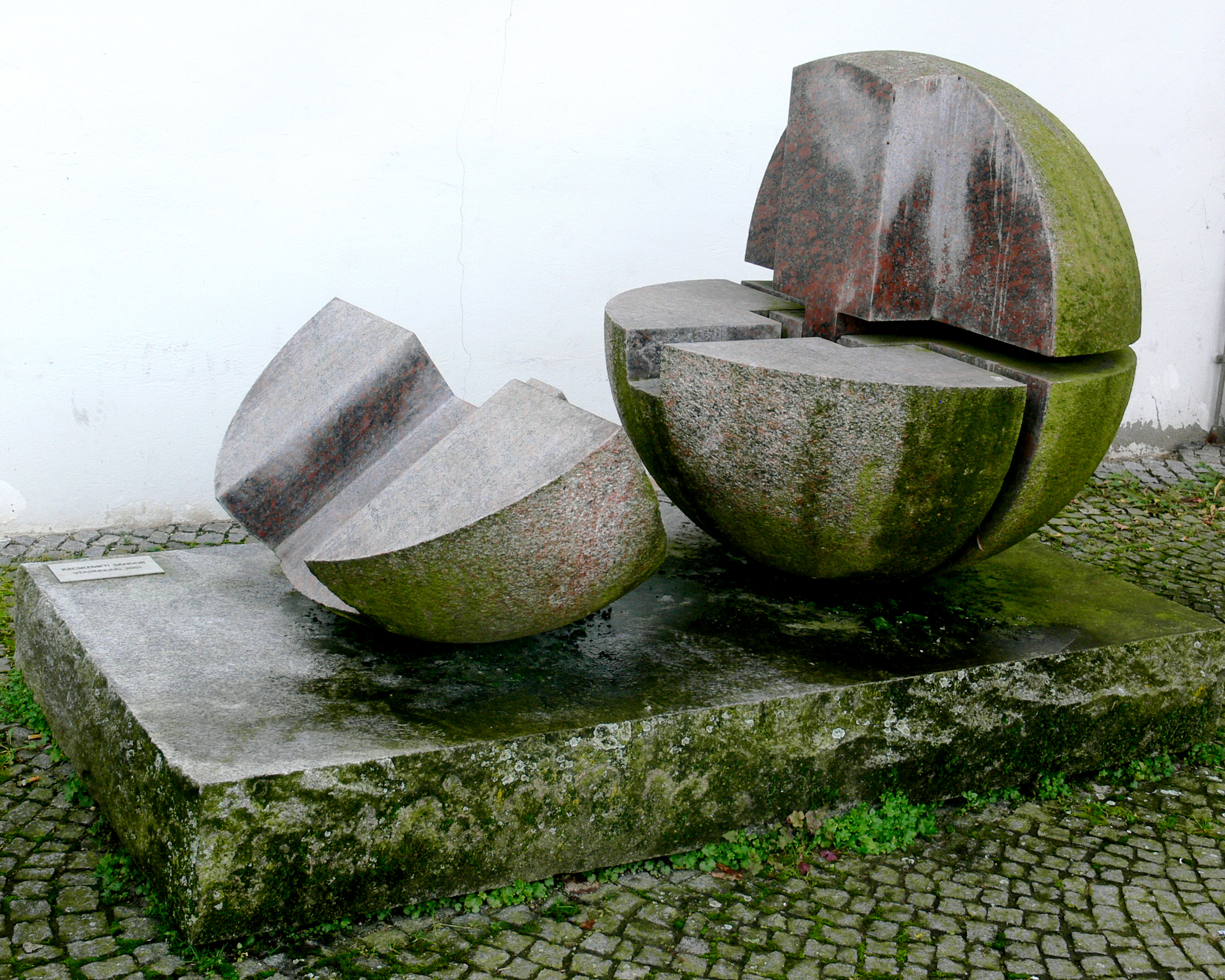 Sándor Kecskeméti: Verbindung, 2001, aufgestellt vor dem Museum Moderner Kunst in Passau